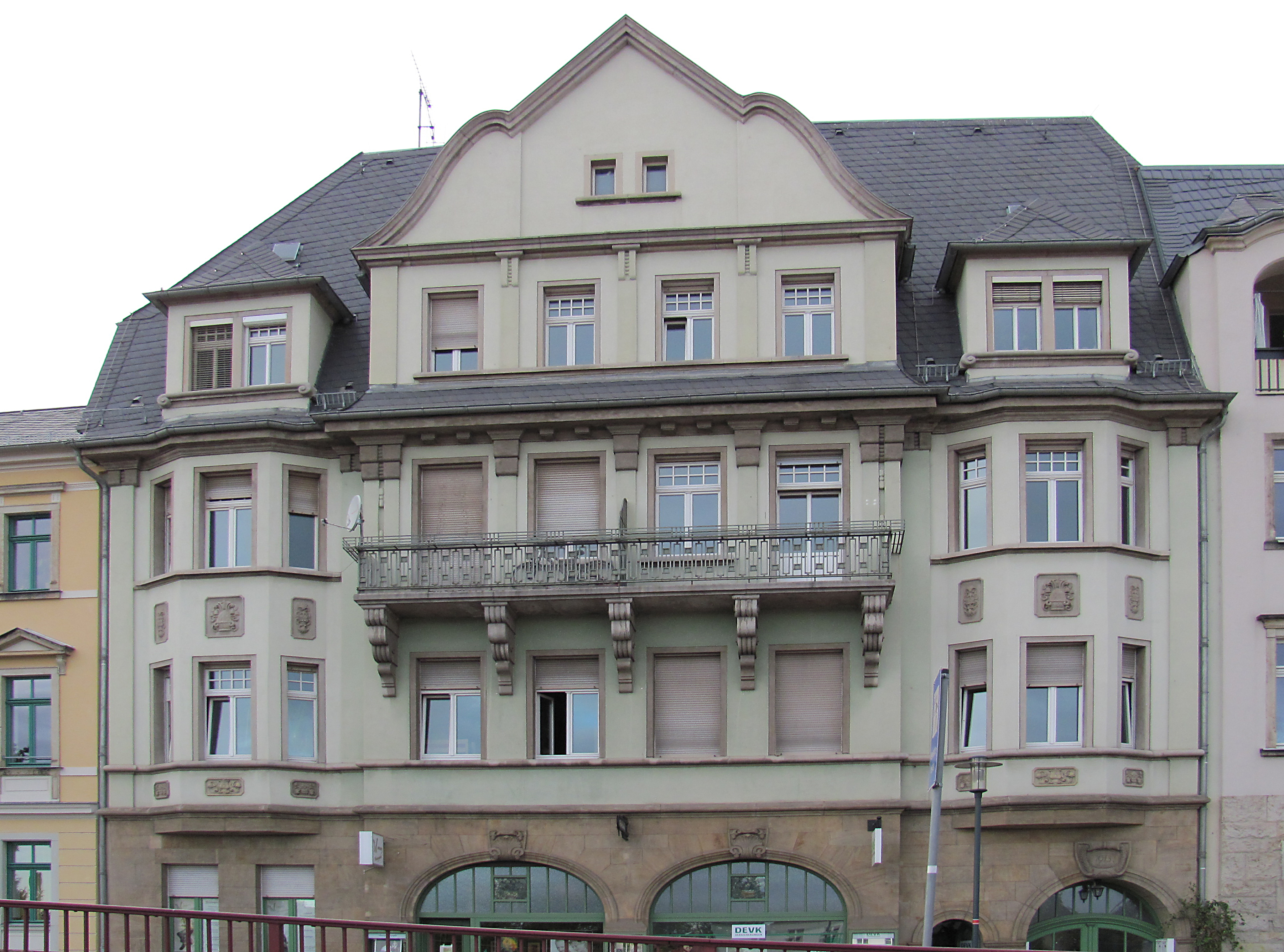 Radebeul, Wohn- und Geschäftshaus Hauptstraße 6